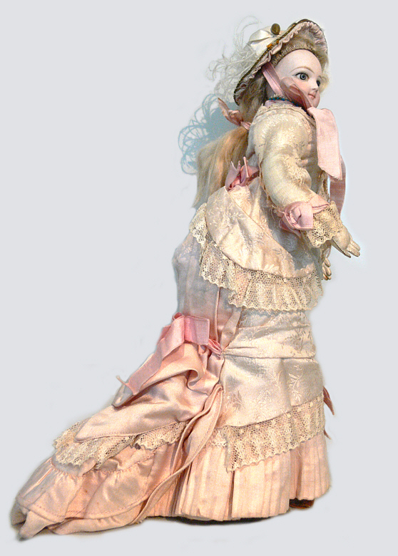 Modepuppe mit Promenadenkleid, Frankreich, um 1870 (vermutlich Emile Jumeau, Paris) Schlossmuseum Aulendorf (Zweigmuseum des Württembergischen Landesmuseums)